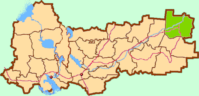 Vologda Oblast map by Al Silonov